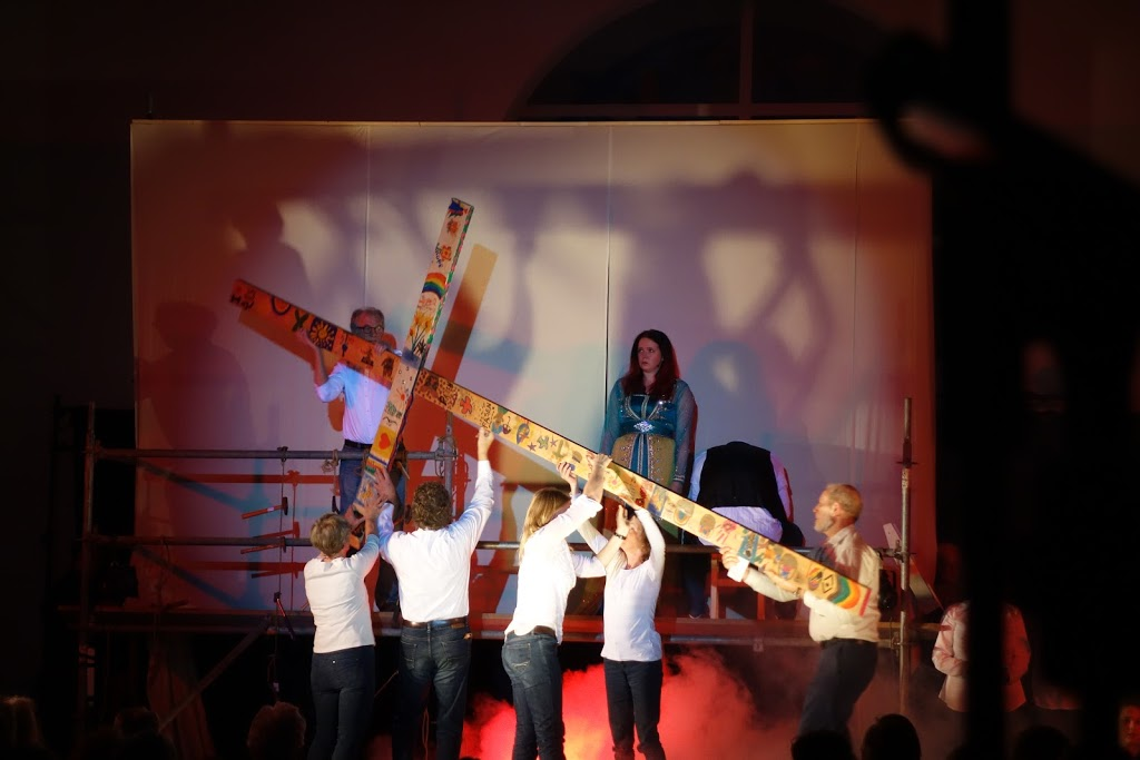 Scene uit 'An Other Passion' 2016 in Haarlem, met het door de 100 deelnemers zelf beschilderde kruis, als variant op de verlichte 'The Passion' kruis uit de tv-versie.